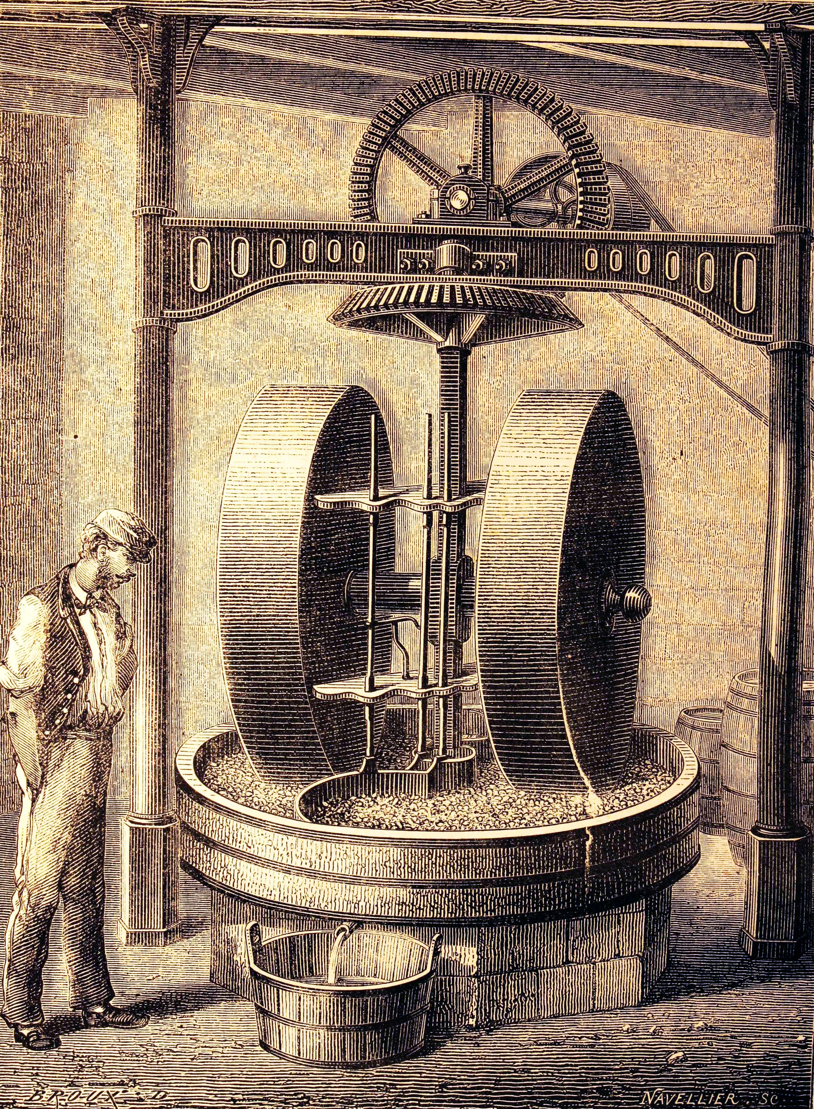 "Moulin pour écraser les graines oléagineuses". Ilustraciones de la obra: Les merveilles de l'industrie ou, Description des principales industries modernes / par Louis Figuier Publicatión: Paris: Furne, Jouvet, [1873-1877] [1]